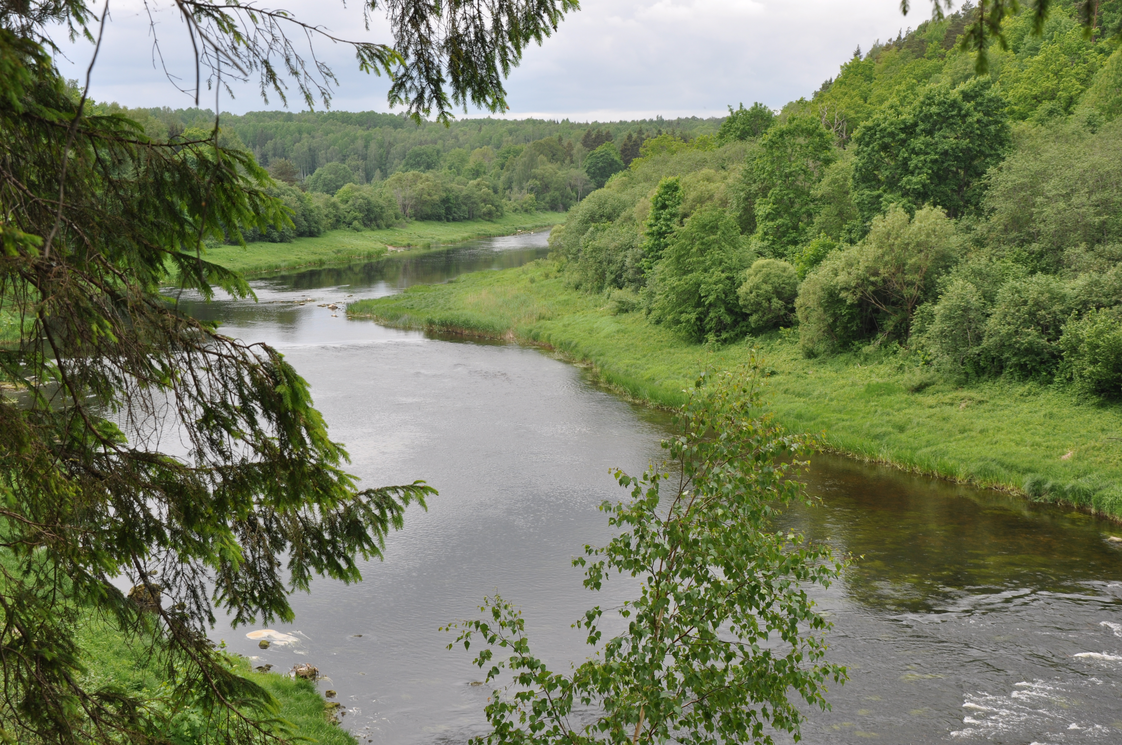 Venta, Skrundas pagasts, Skrundas novads, Latvia